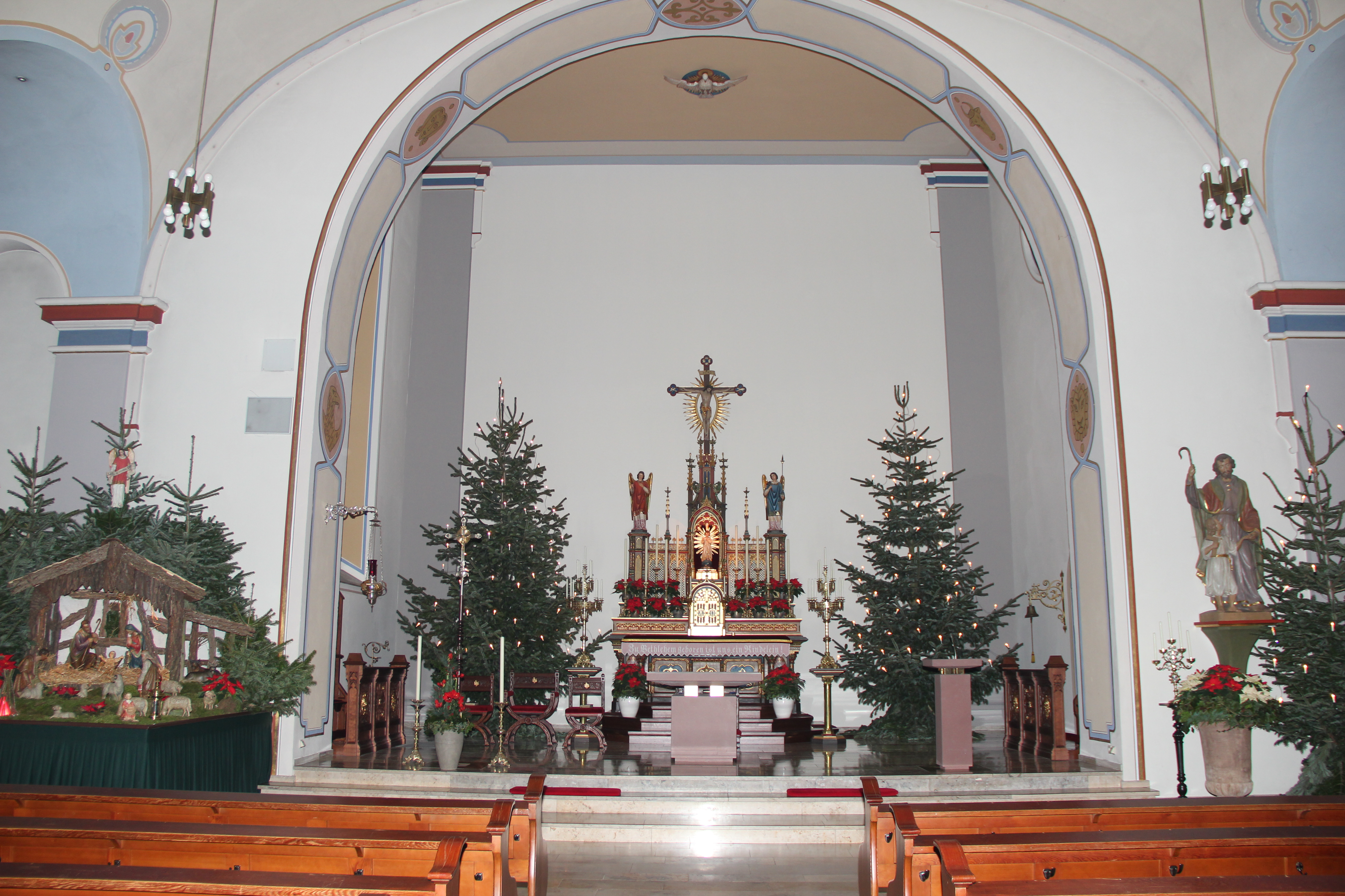 Innenansicht der Kirche St. Joseph in Ostenland in der Weihnachtszeit